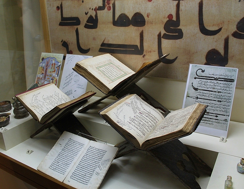 Рукописи Корана, Музей истории Азербайджана.